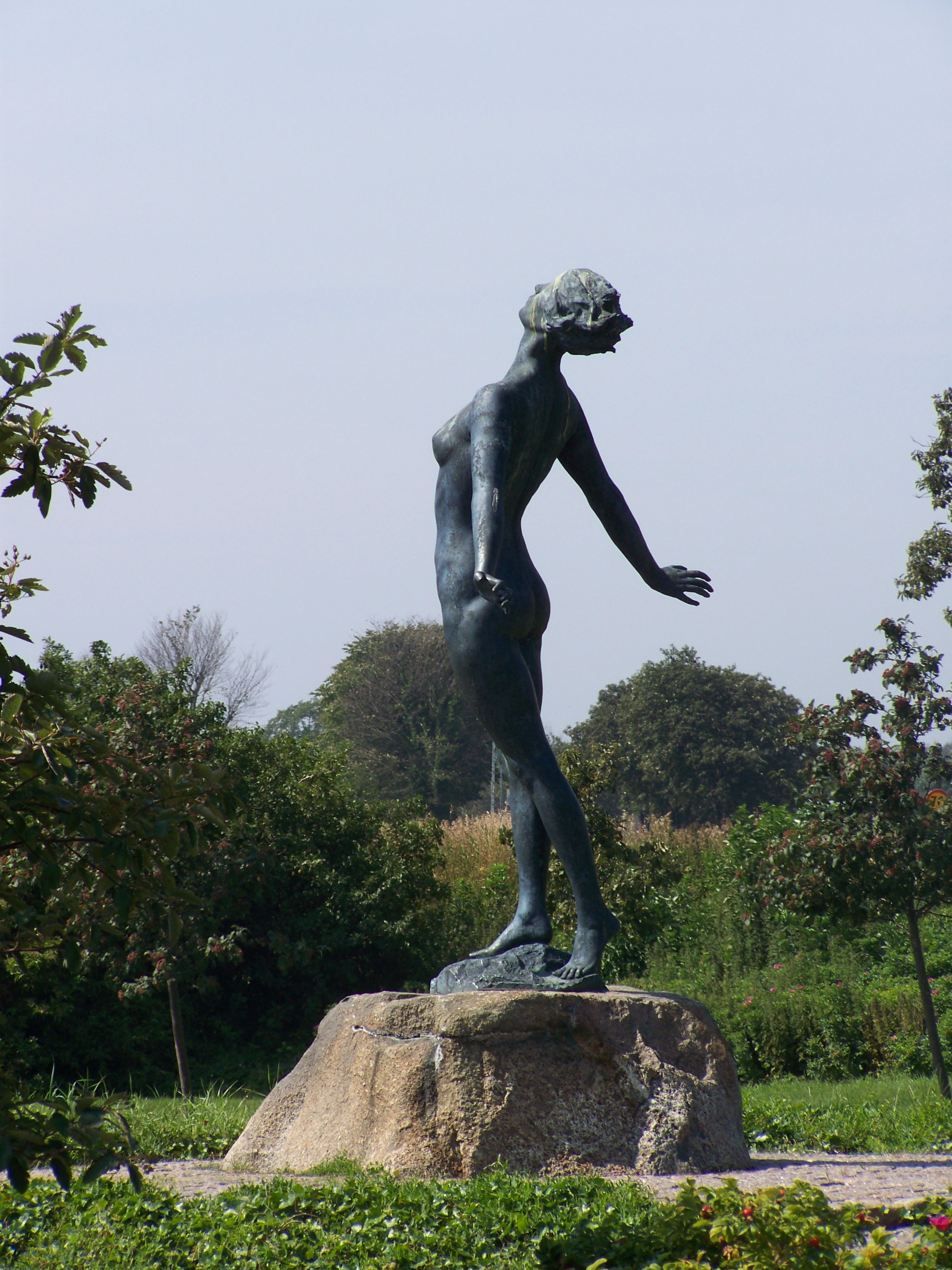 In Sweden. Smygehuk